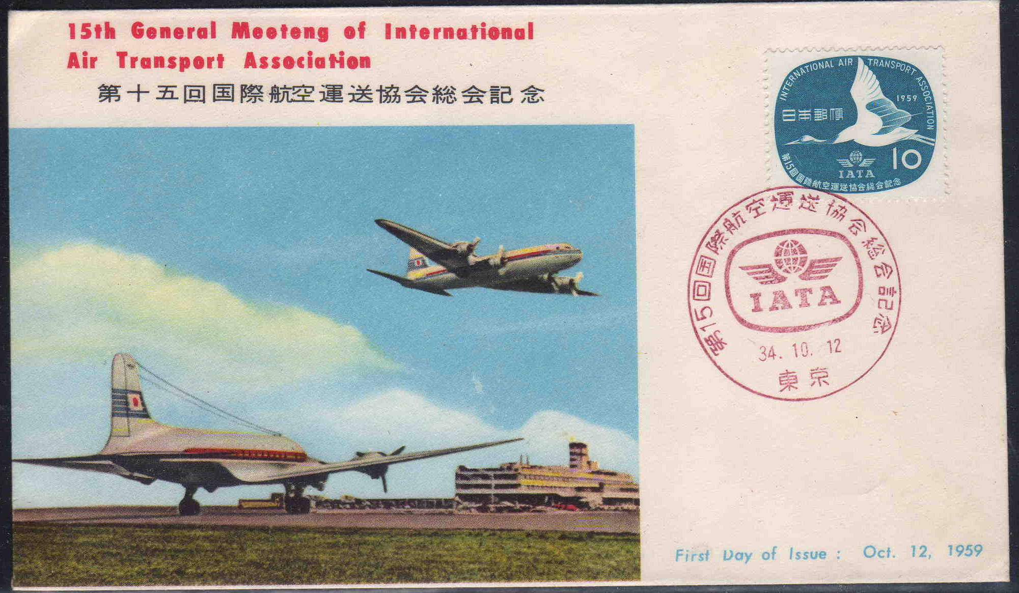 郵政弘済会が製作した初日カバー。カッシュに描かれているのは当時の羽田空港ターミナルビルと日本航空のＤＣ-6である。